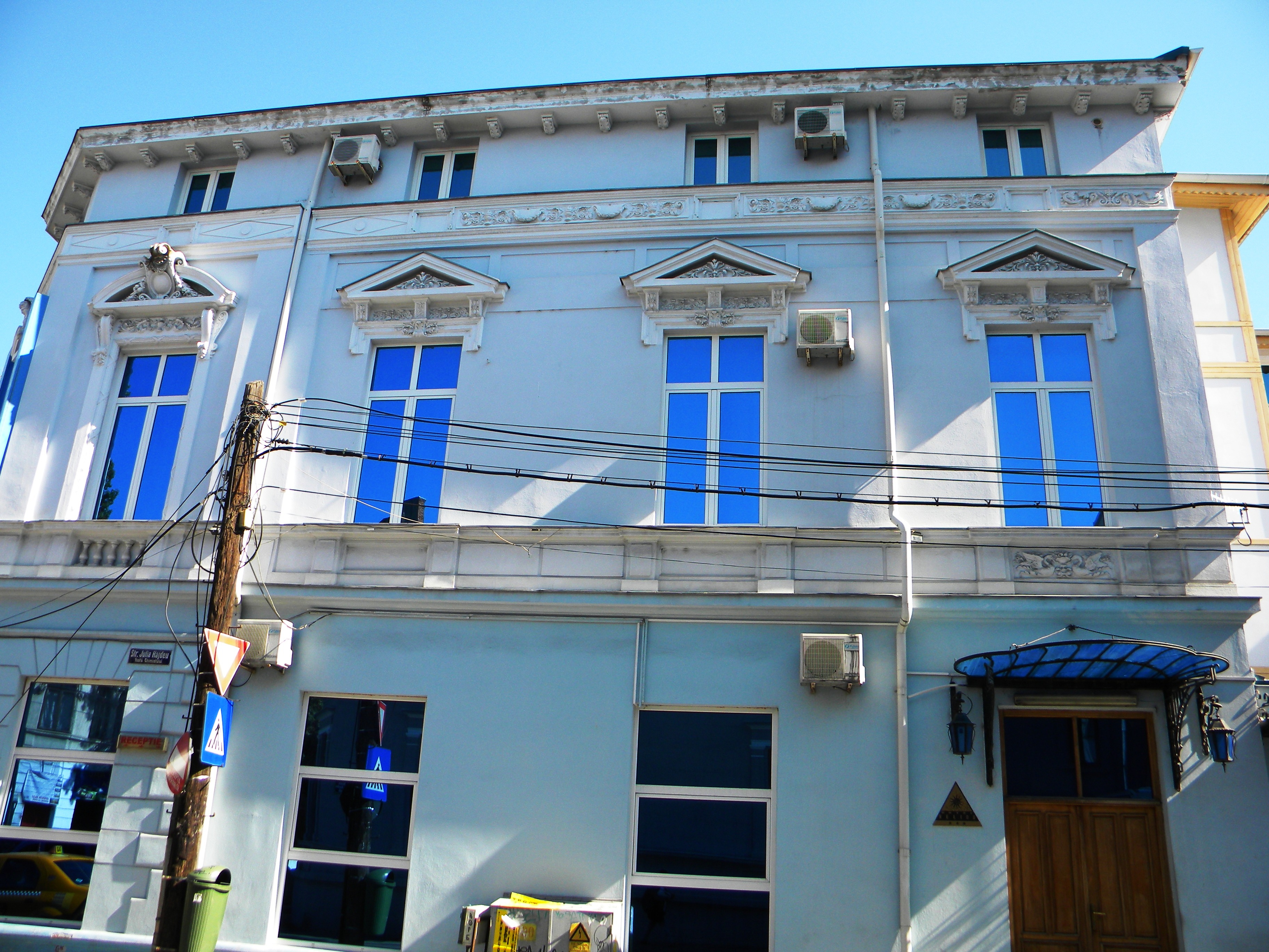 Bucuresti, Romania, Casa pe Str. Iulia Hasdeu nr. 16, sect. 1